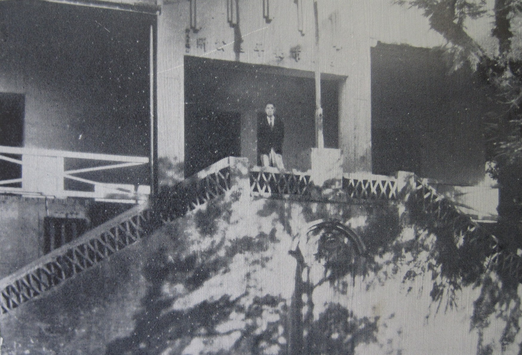 1950年代的臺南市安平區公所，今之熱蘭遮城博物館。